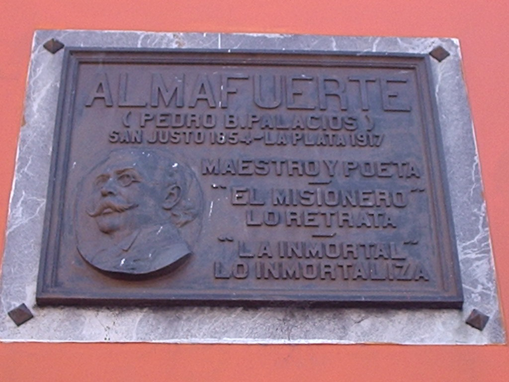 Placa de Homenaje a Almafuerte en 43 esquina 1 La Plata